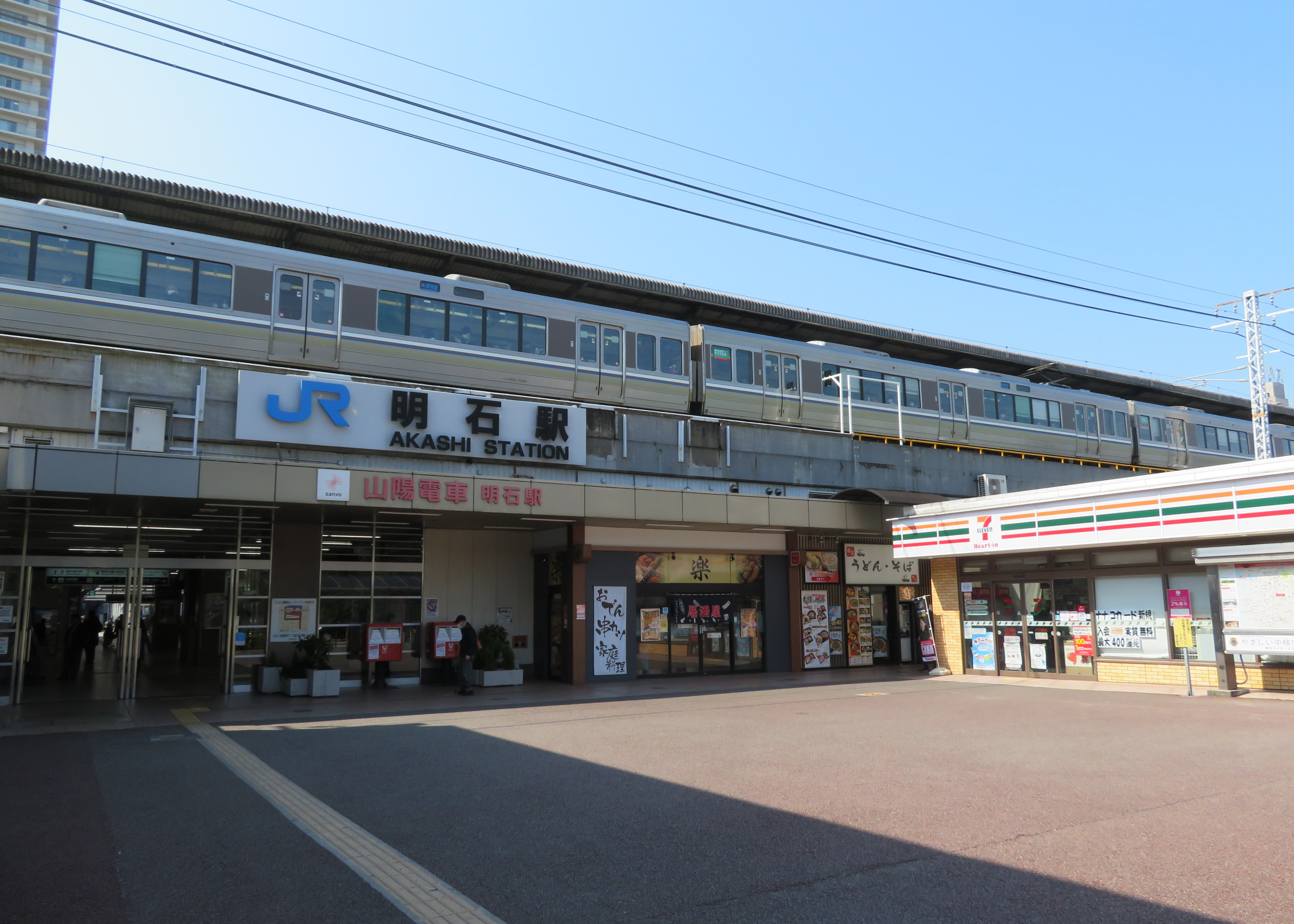 JR明石駅北口